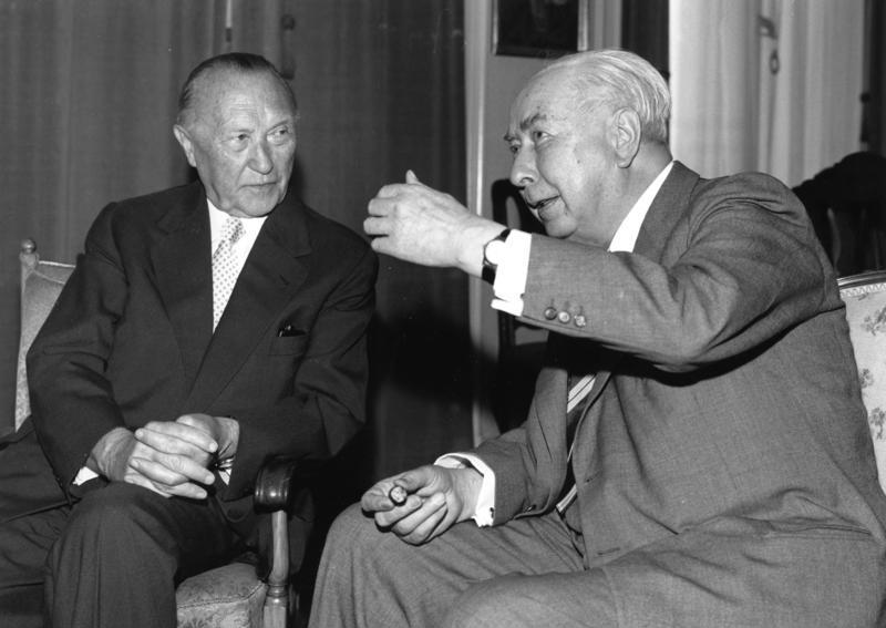 Bundespräsident Theodor Heuss und Bundeskanzler Konrad Adenauer am 14.9.1959